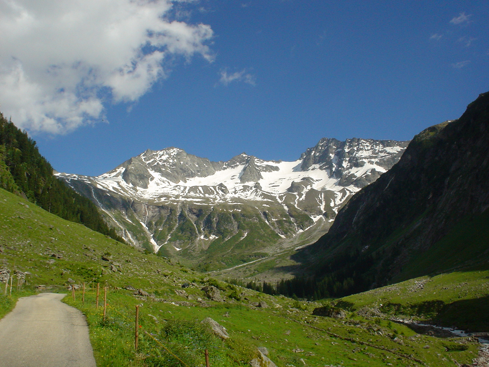 Blick aus dem Stilluptal auf den Quellbereich der Stillup. In der Mitte das "Westliche Stillupkees". Dahinter (v.l.n.r.): Grüne-Wand-Spitze (2946m), Kasseler Spitze (2952m) und Keilbachspitze (3094m). Blickrichtung Südost.